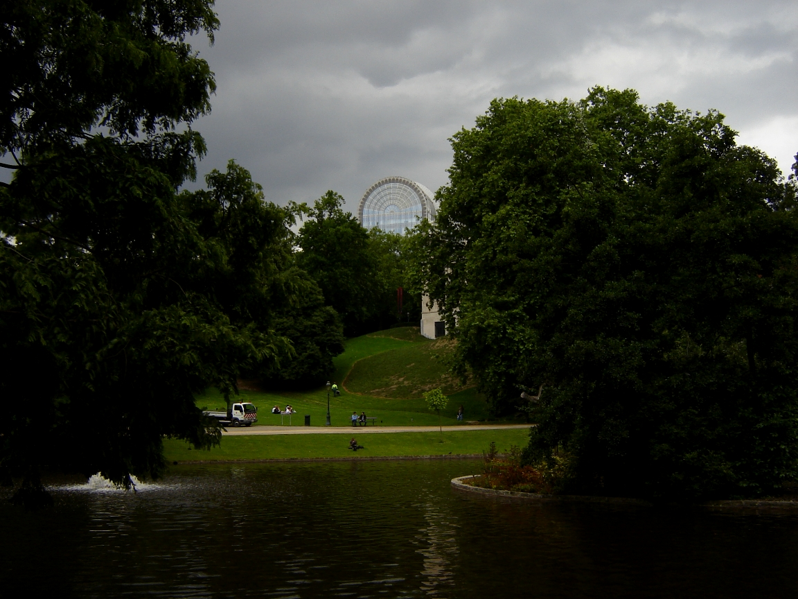 Leopold Park in Brussels, Belgium